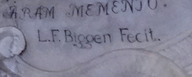 Signatur des Bildhauers Lorenz Franz Biggen am Goeken-Grabmal in St. Georg Grauhof